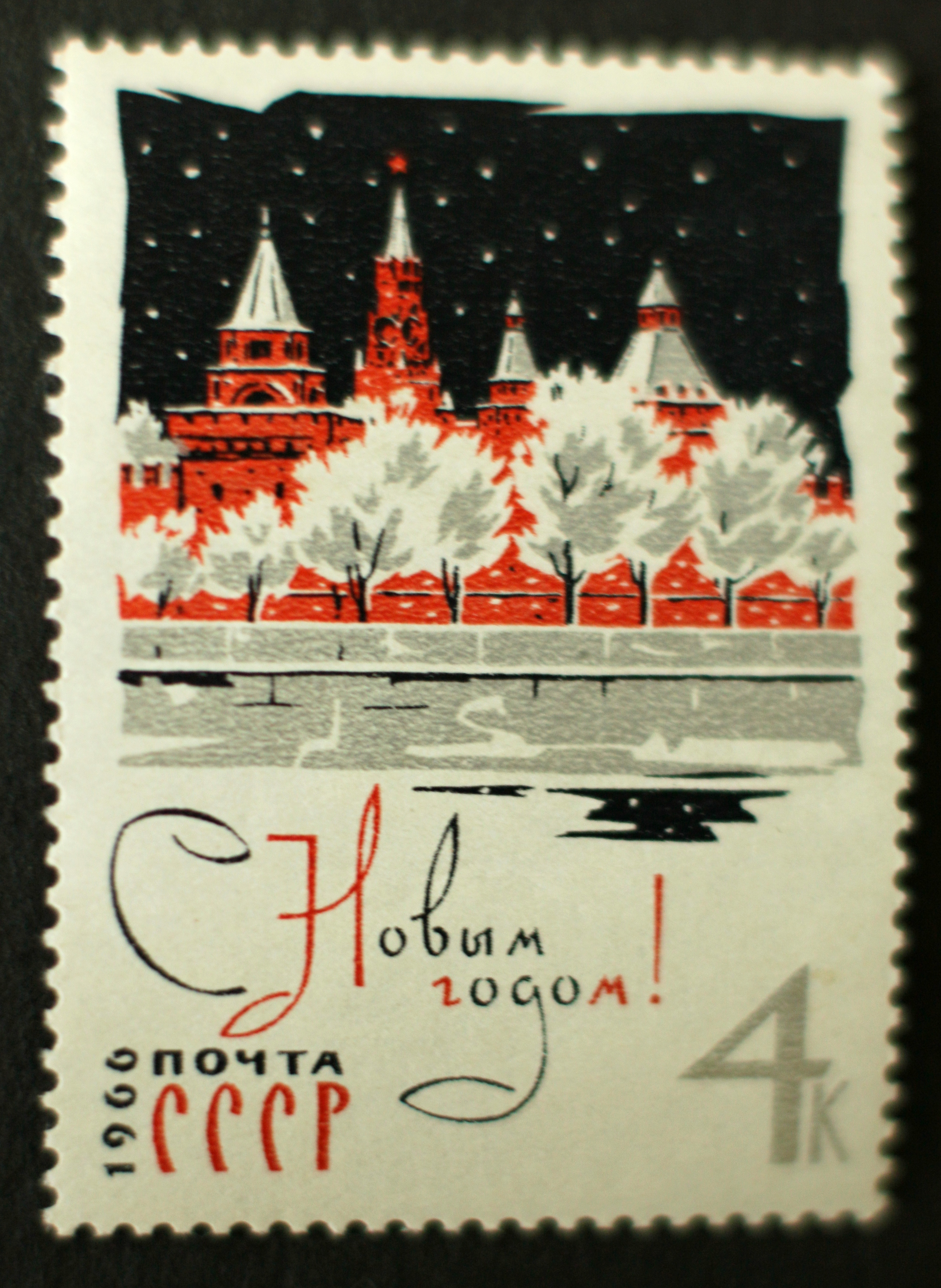 Briefmarke, Sowjetunion, 1966